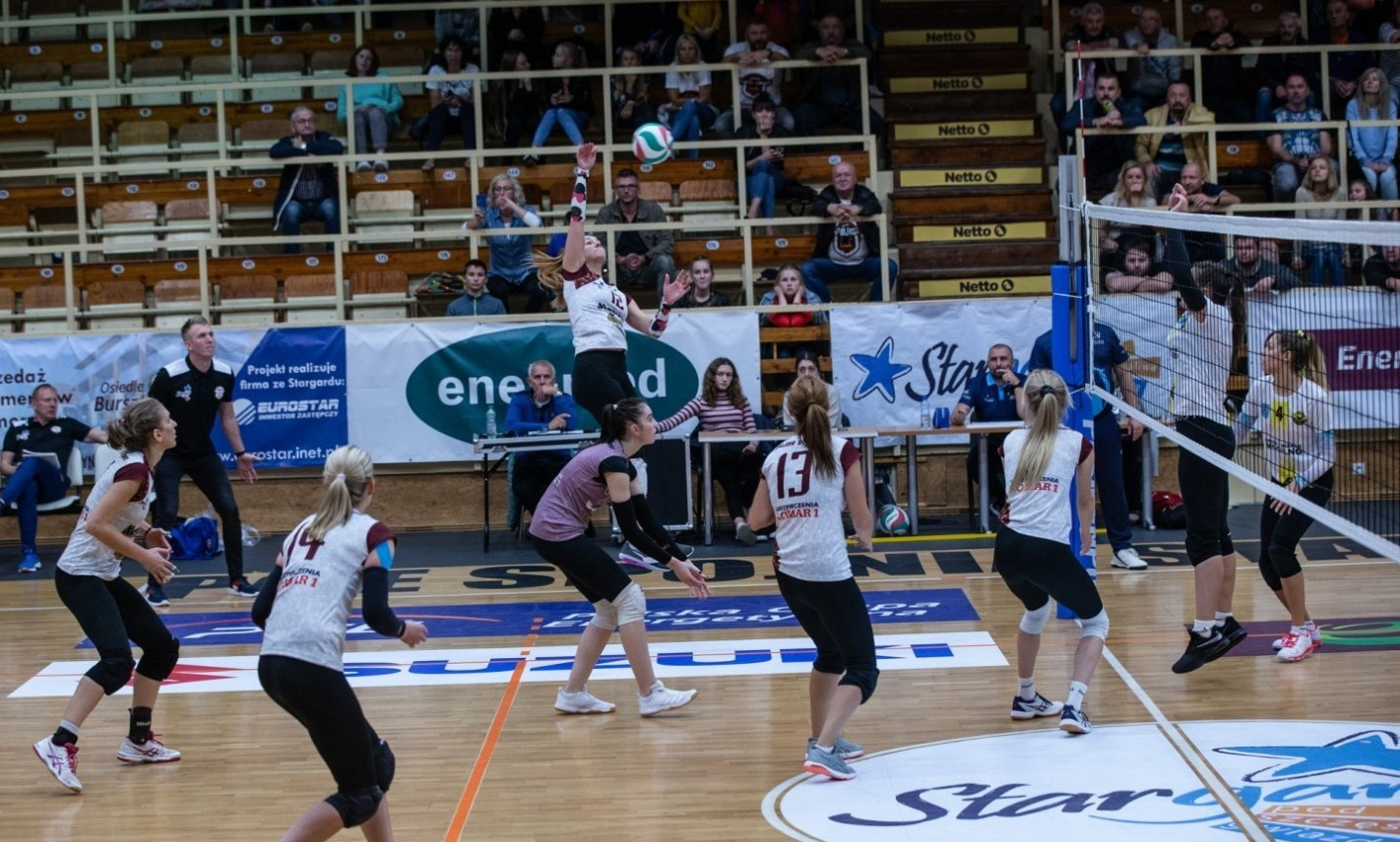 Stargard, 28.09.2019. KS Spójnia Stargard - Sokół Mogilno